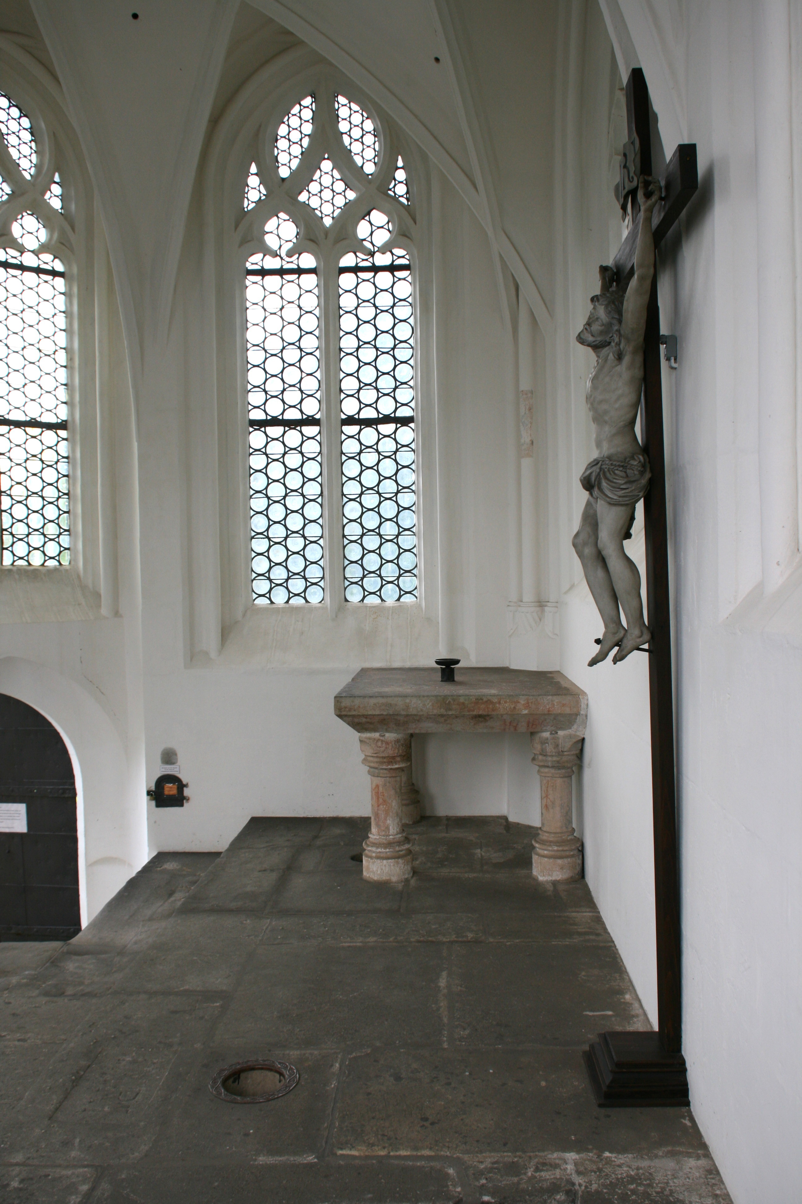 Golgathakapelle, Oberkapelle der Heilig-Kreuz-Kapelle in der Anlage Heiliges Grab, Heilige-Grab-Straße in Görlitz